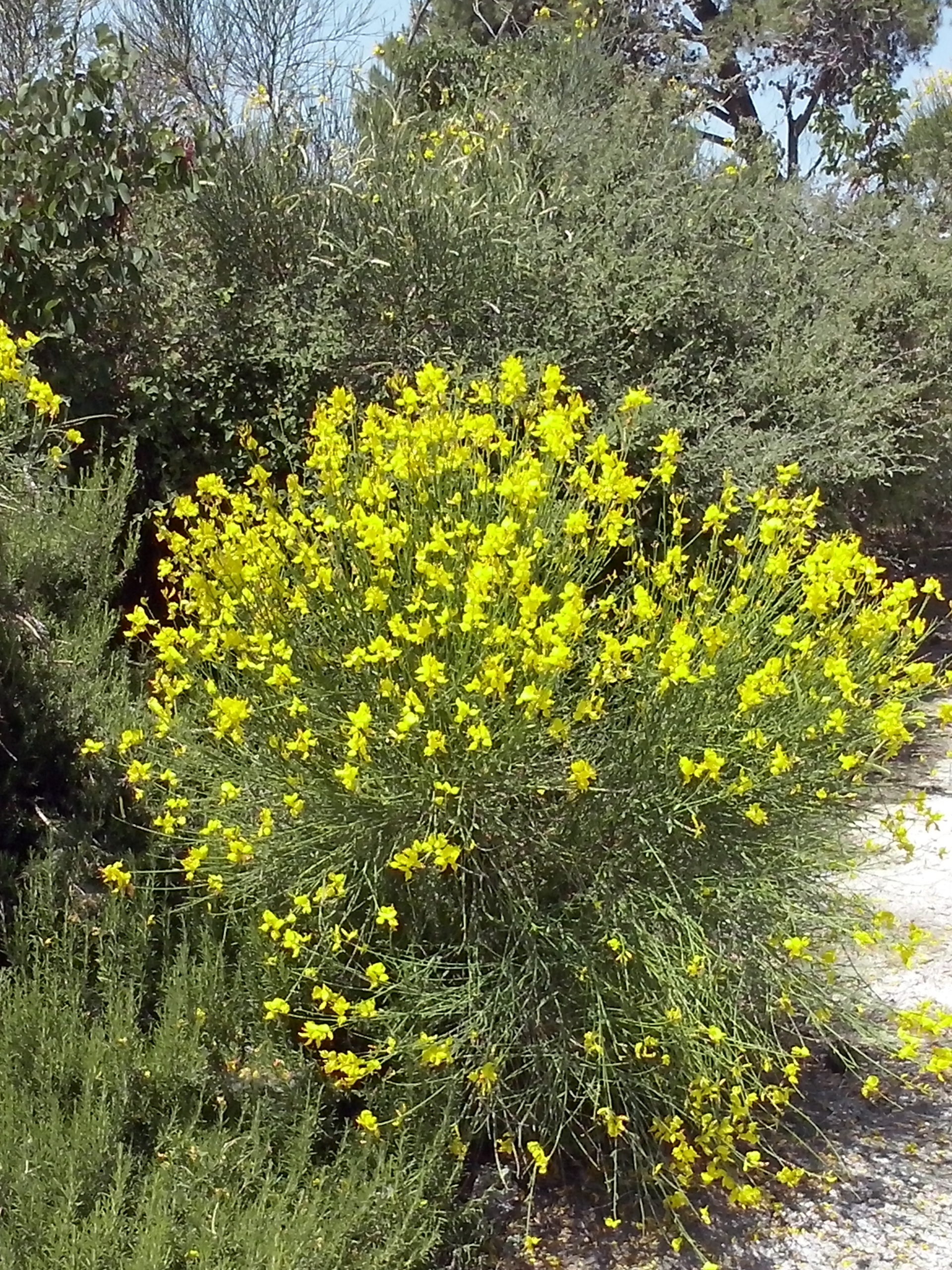 אחירותם החורש צולם בגבעה הצרפתית בירושלים מאי 2014